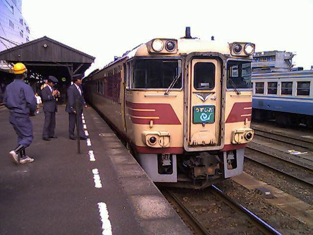 徳島駅にて キハ181系うずしお